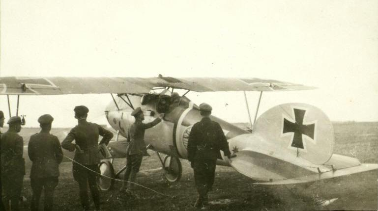 Die neue Fliegerabteilung (A) 272 Oblt. Eduard Schleich, Führer der Jagdstaffel 21 kommt zu Besuch. Flugzeug Typ Albatros D V